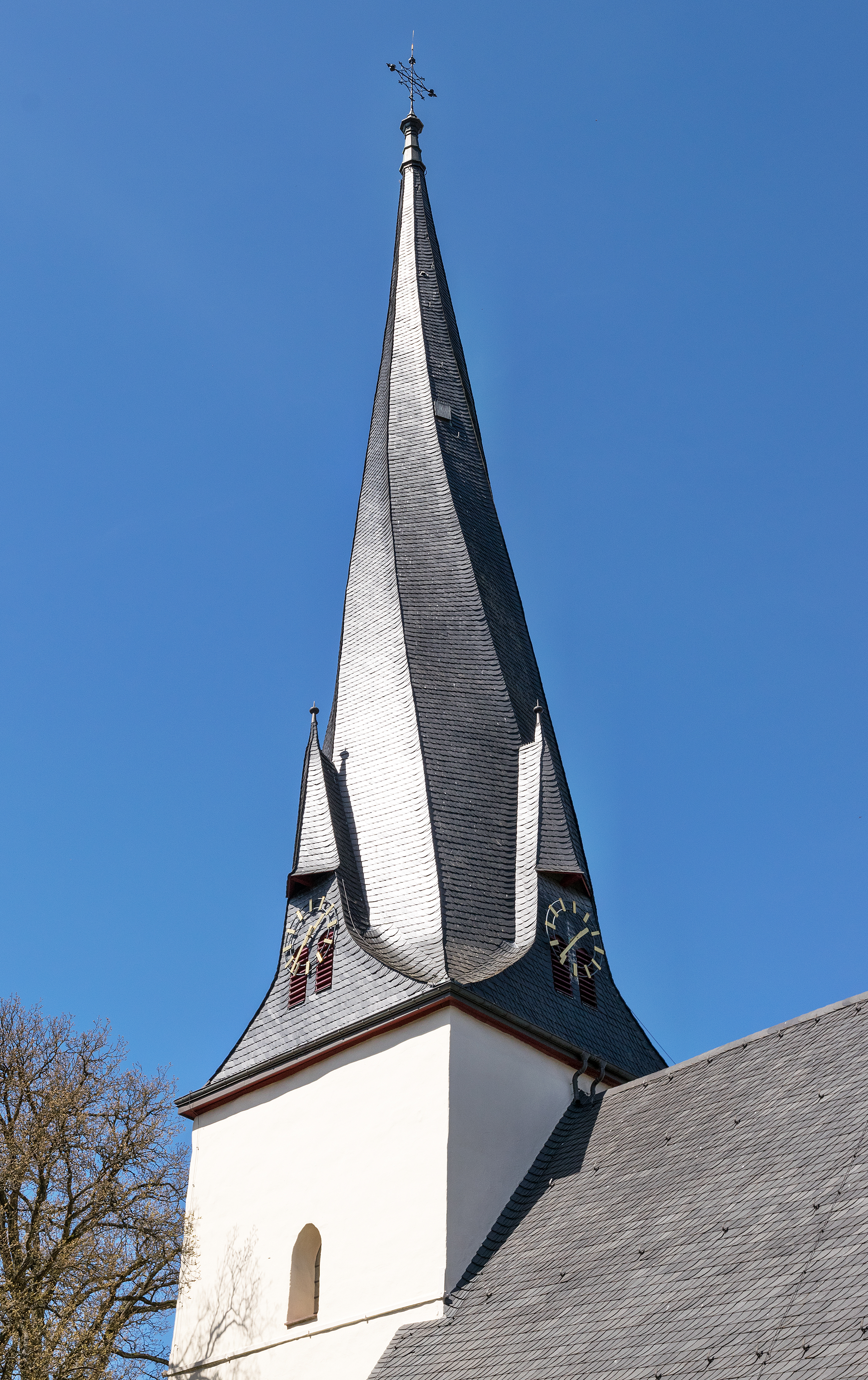 Turm der ev. Kirche in Breidenbach